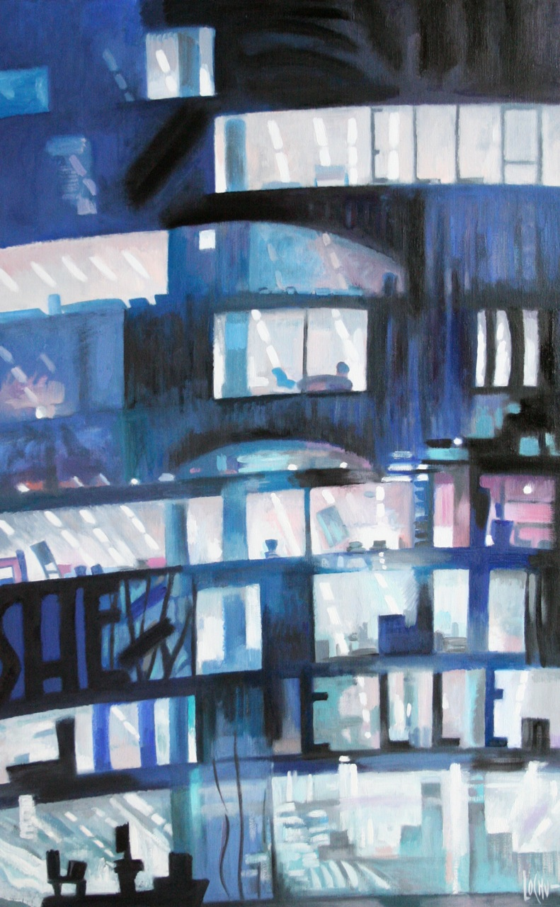 Urban Night Writing -116x73, Huile sur toile, 2010, Claude-Max Lochu